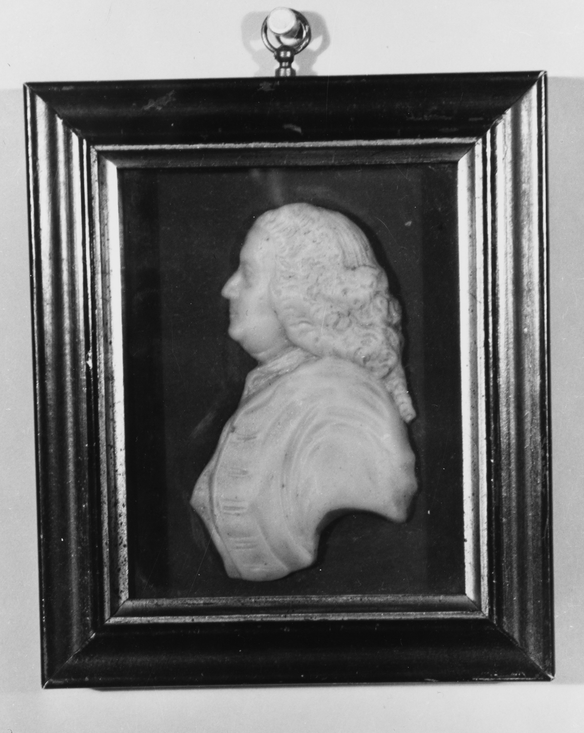 Bust; Natural Substances